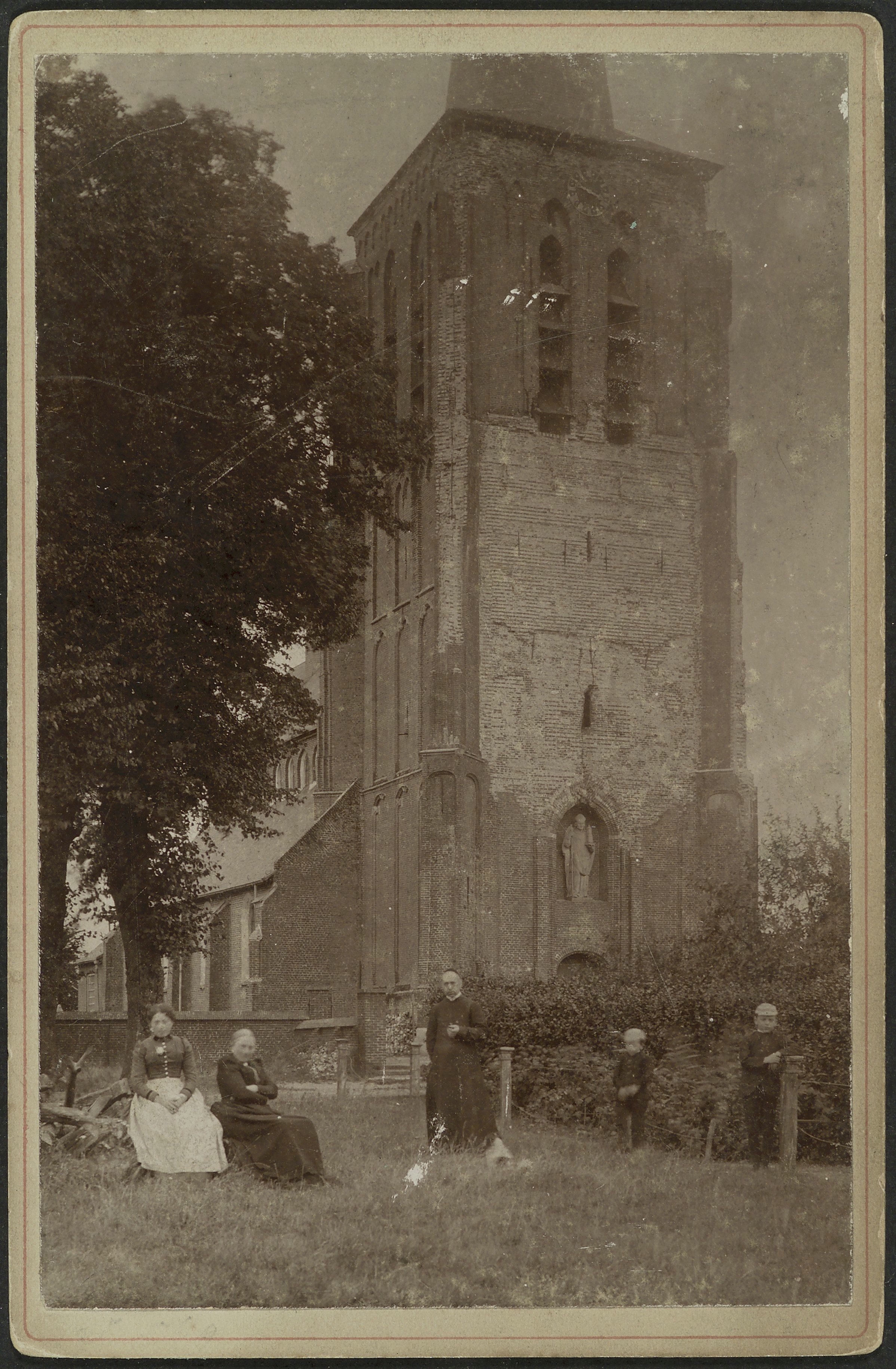 Rooms-Katholieke Kerk: Toren vanuit het noordwesten (opmerking: Kabinetfoto)